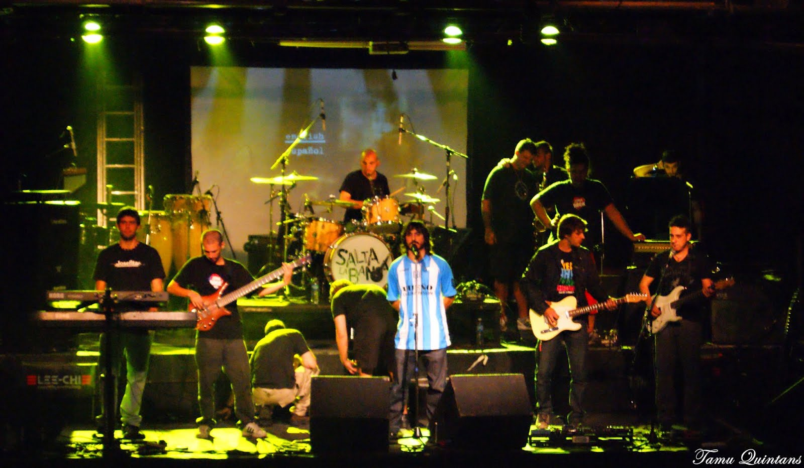 Salta la Banca